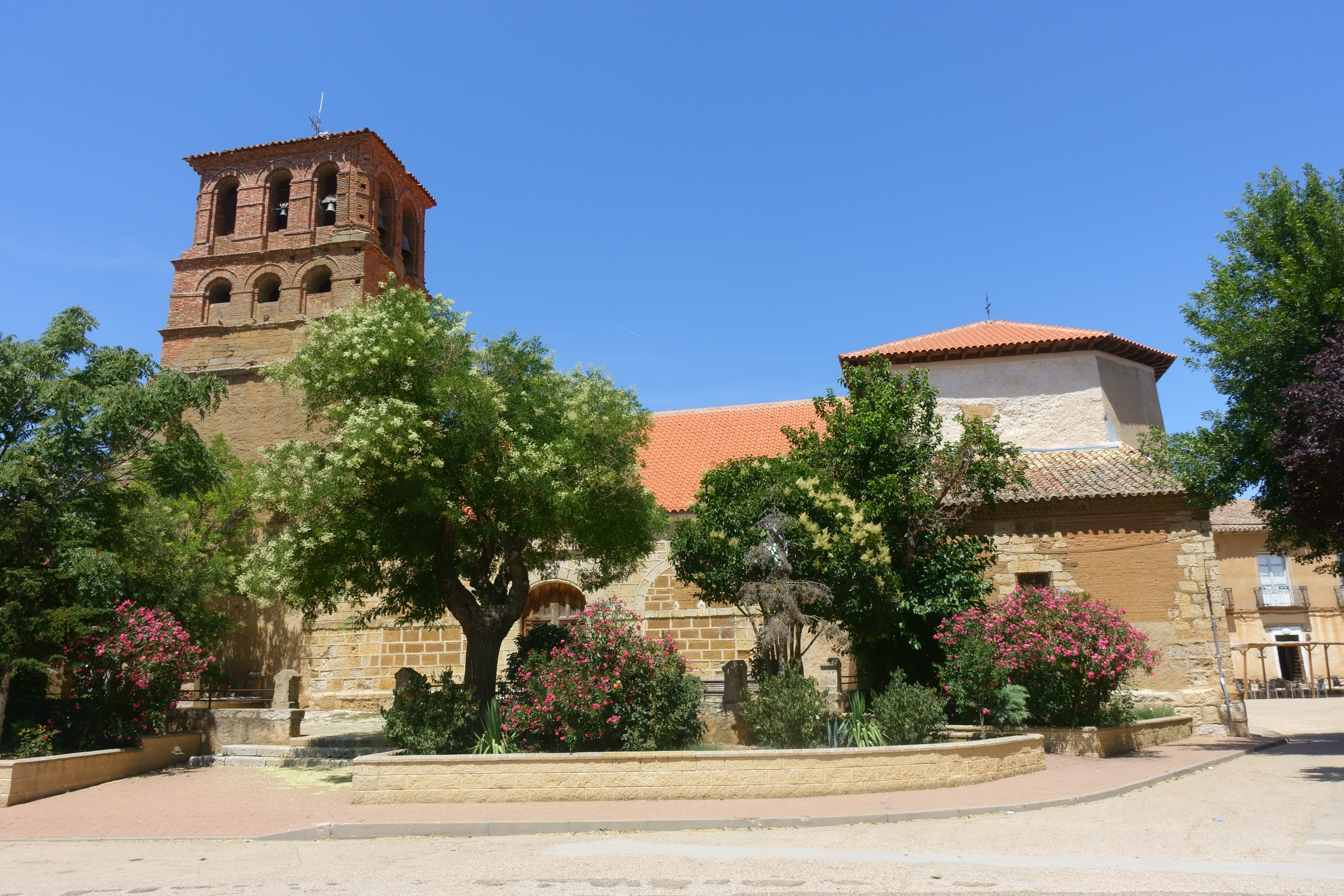 Iglesia de San Cristóbal, Villafrechós (Valladolid, España).